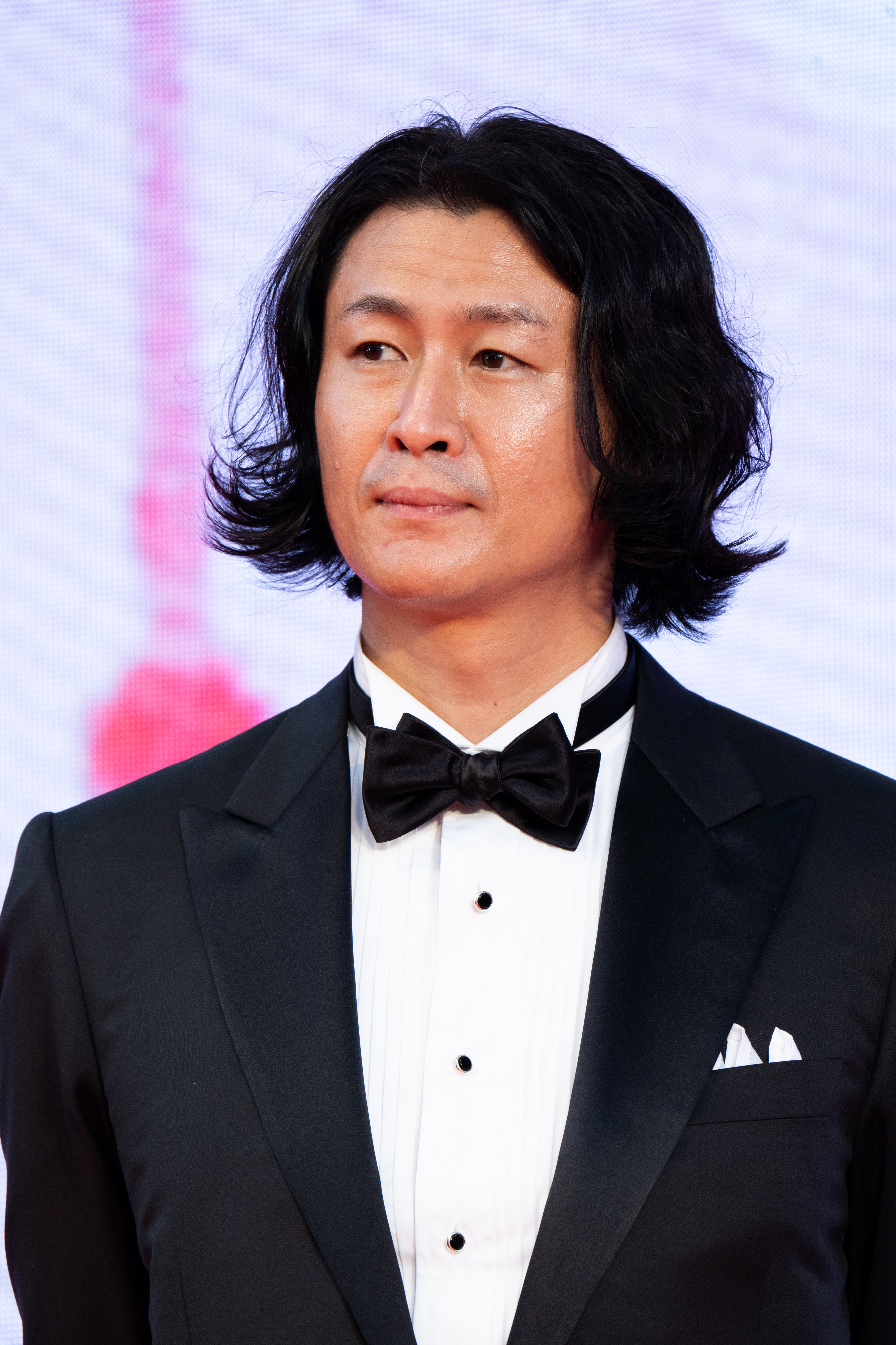 第32回 東京国際映画祭 オープニングセレモニー 冲方丁 (HUMAN LOST 人間失格)